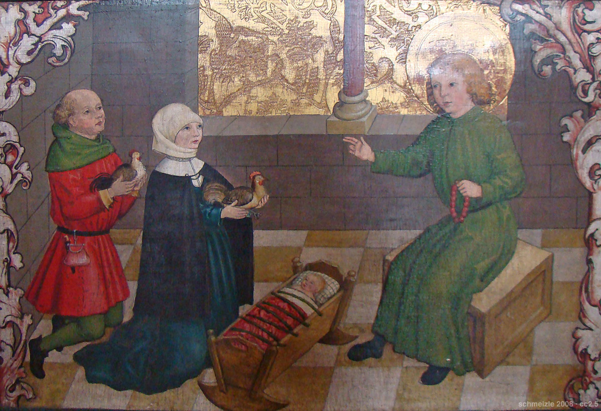 Detail von der Predella des Veitsaltars in der Veitskirche in Flein. Fleiner Vogt und Altarstifter Conrad Erer mit Frau und Kind vor dem Hl. Veit